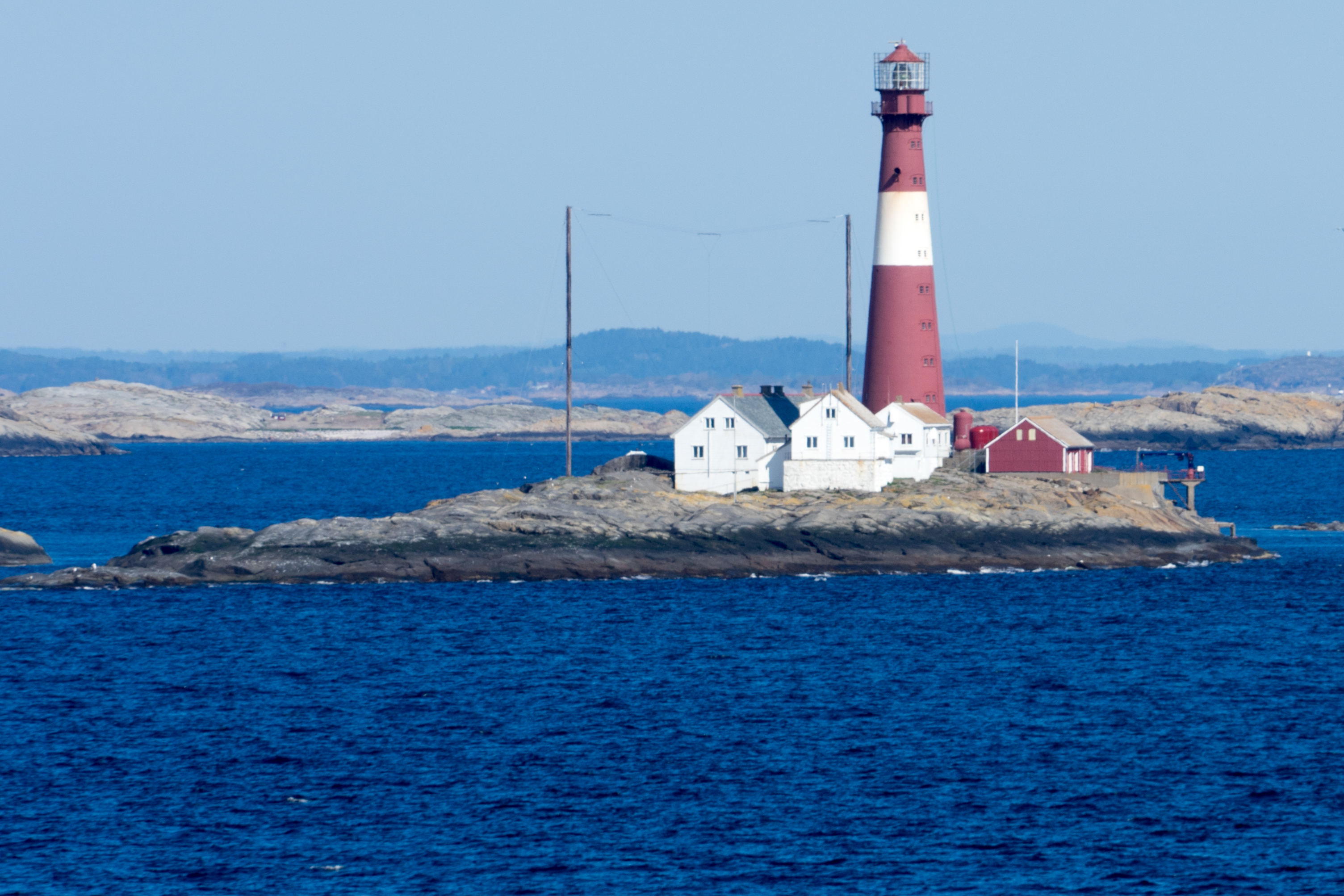 2018-05-10 Færder fyr (6)